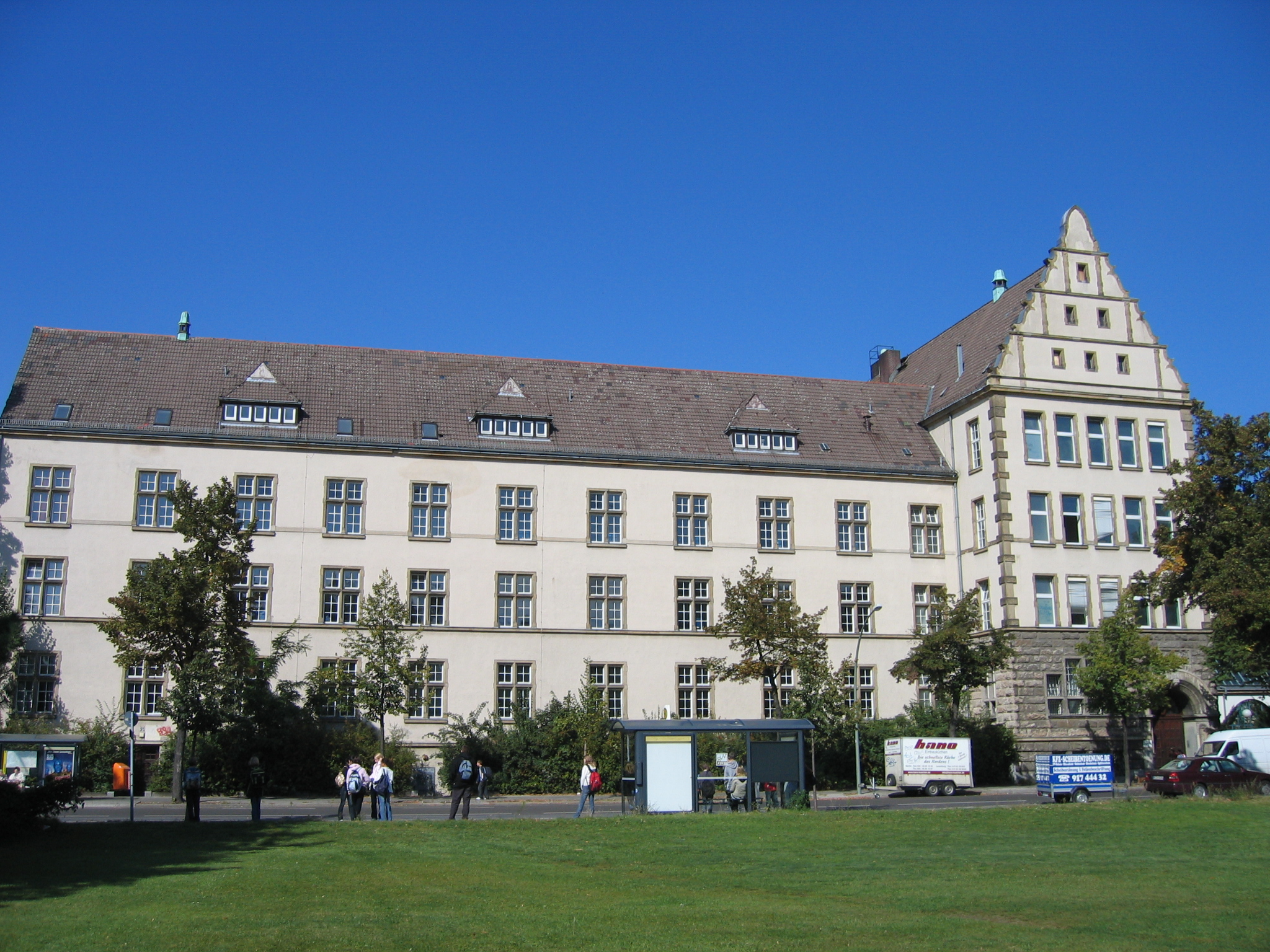 Friedrich-Engels-Gymnasium in Berlin-Reinickendorf